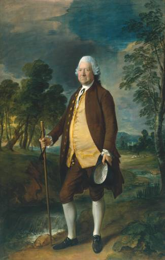 Portrait of Sir Benjamin Truman (1699-1780)